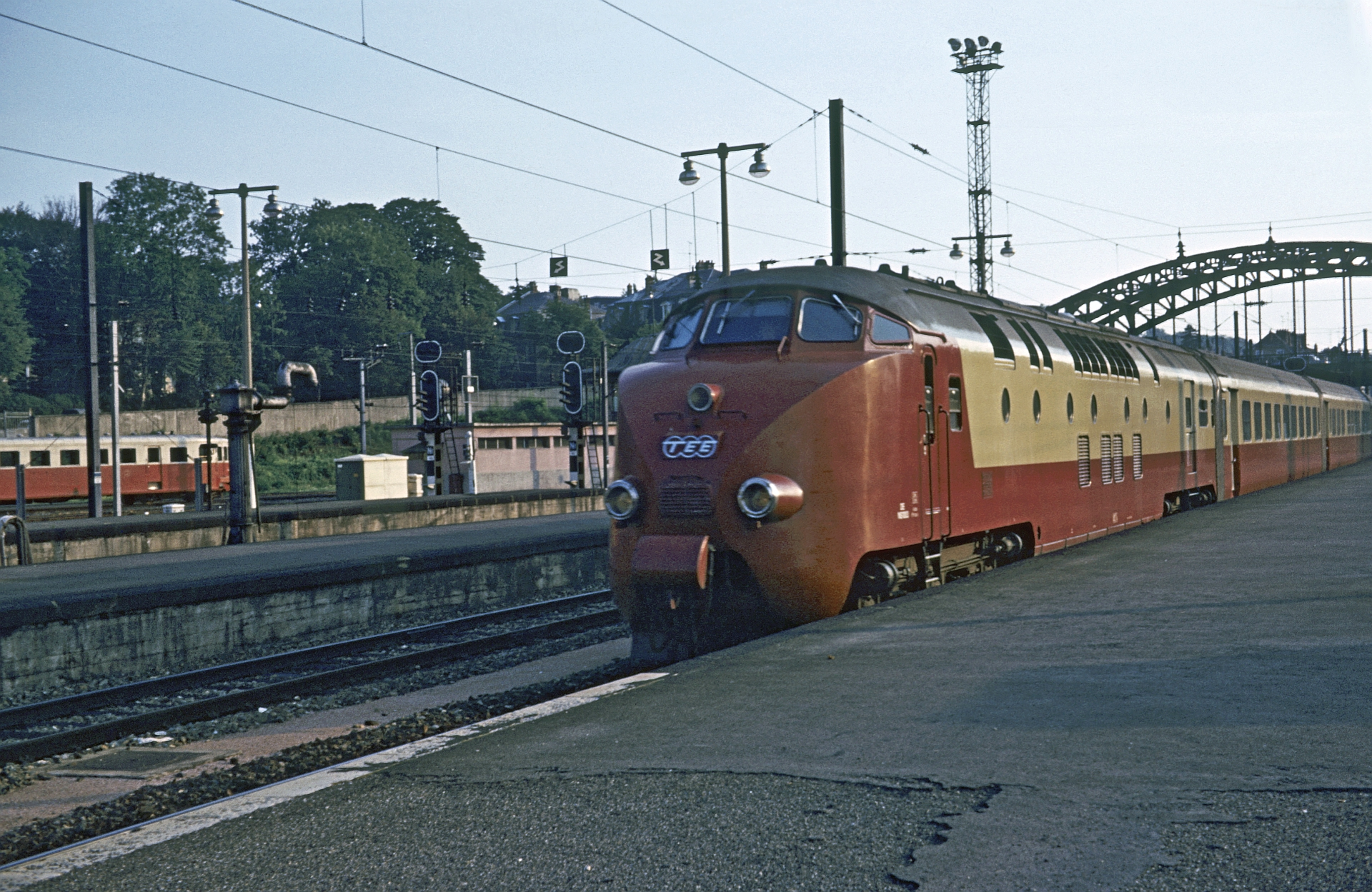 France - Mulhouse , SBB/NS TEE Edelweiss Amsterdam-Luxembourg-Strasbourg-Zürich, July 1973